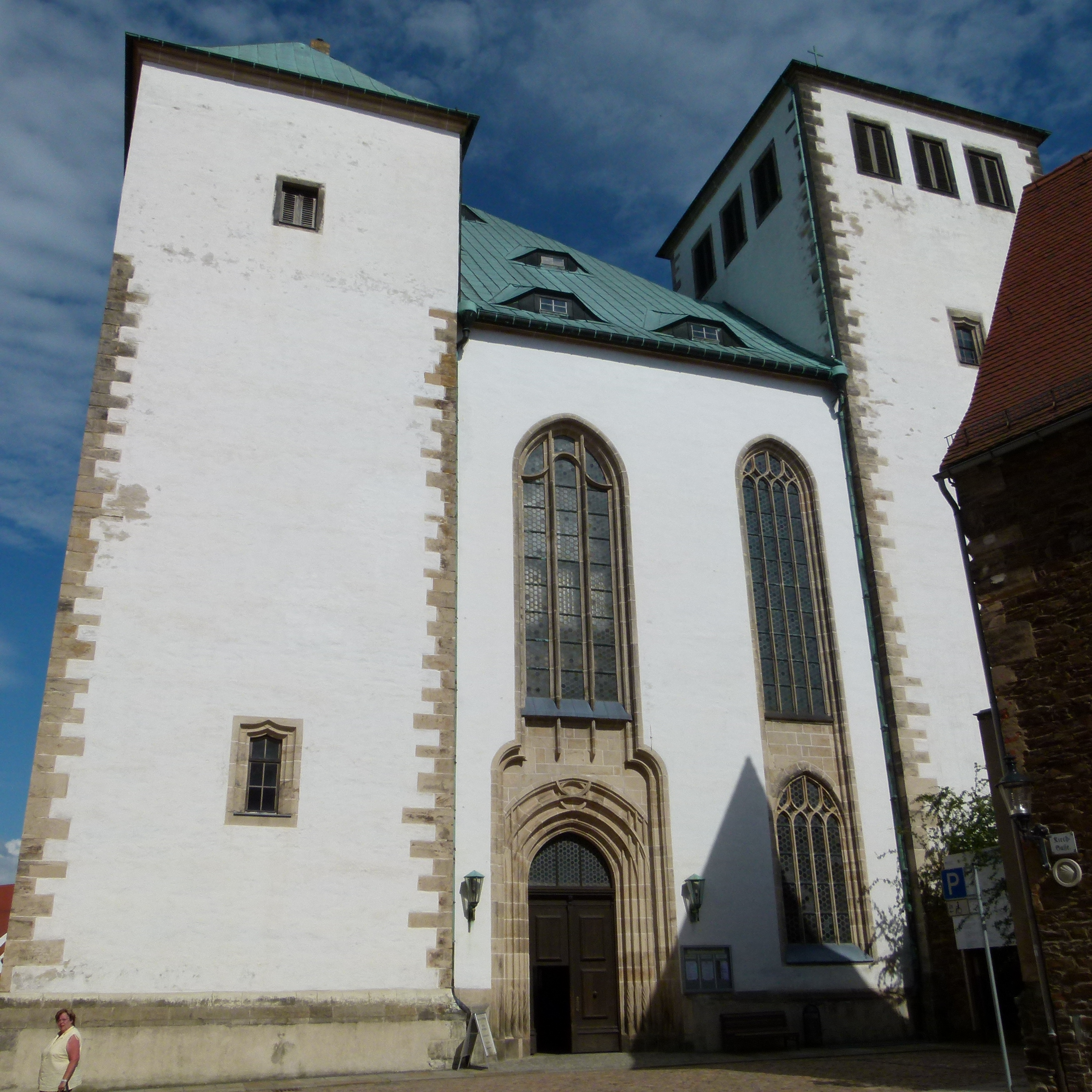 Eingang zum Freiberger Dom, Freiberg, Sachsen